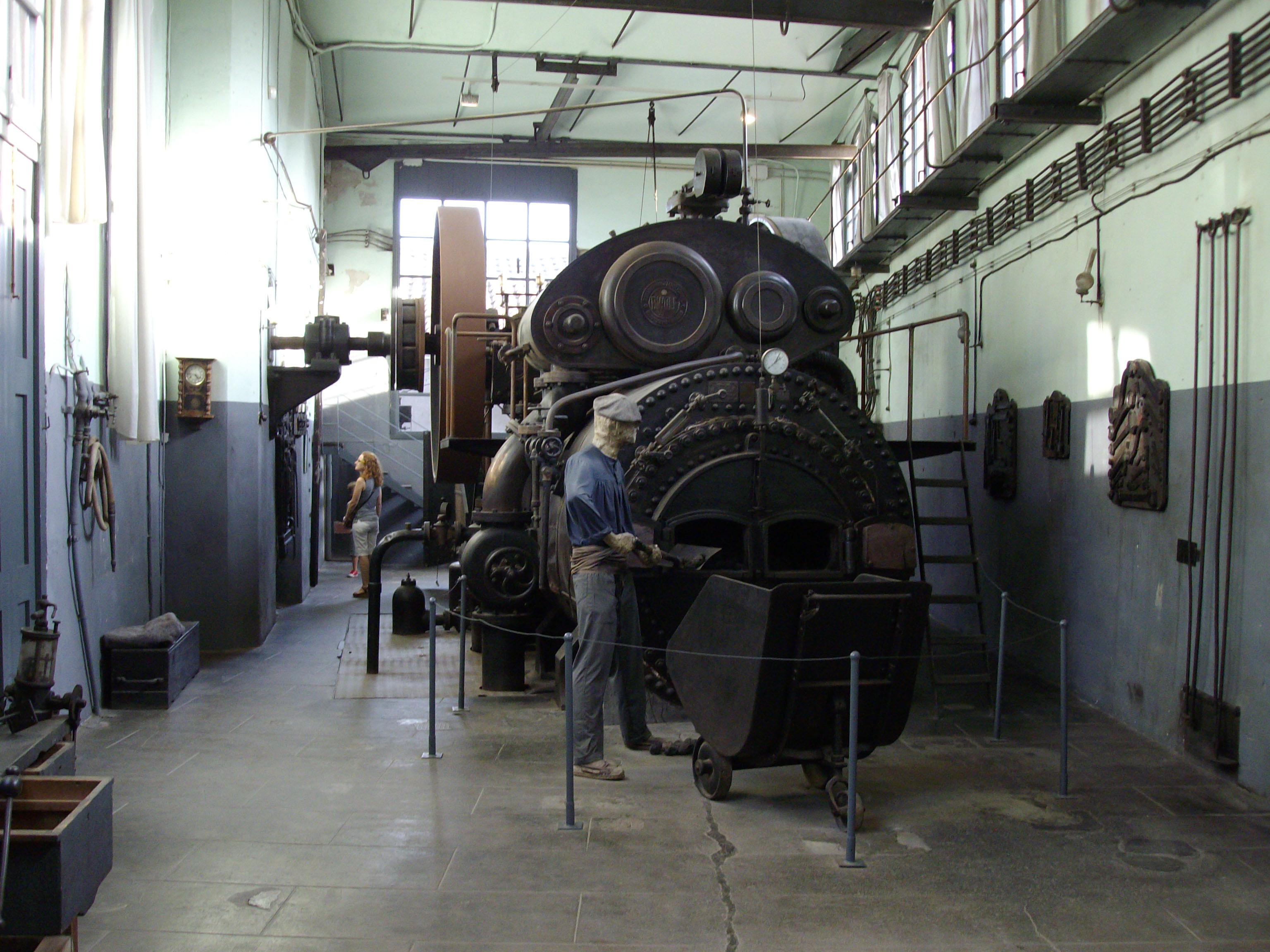 Máquina de vapor semifija Wolf del antiguo vapor textil Buxeda Vell, con una potencia de 300 cv, y fabricada por la empresa alemana Buckau R. Wolf, de Magdeburgo. Se instaló en 1908, construyendo una nueva sala de máquinas para tal fin, proyecto realizado por el ingeniero sabadellense Francesc Izard i Bas.